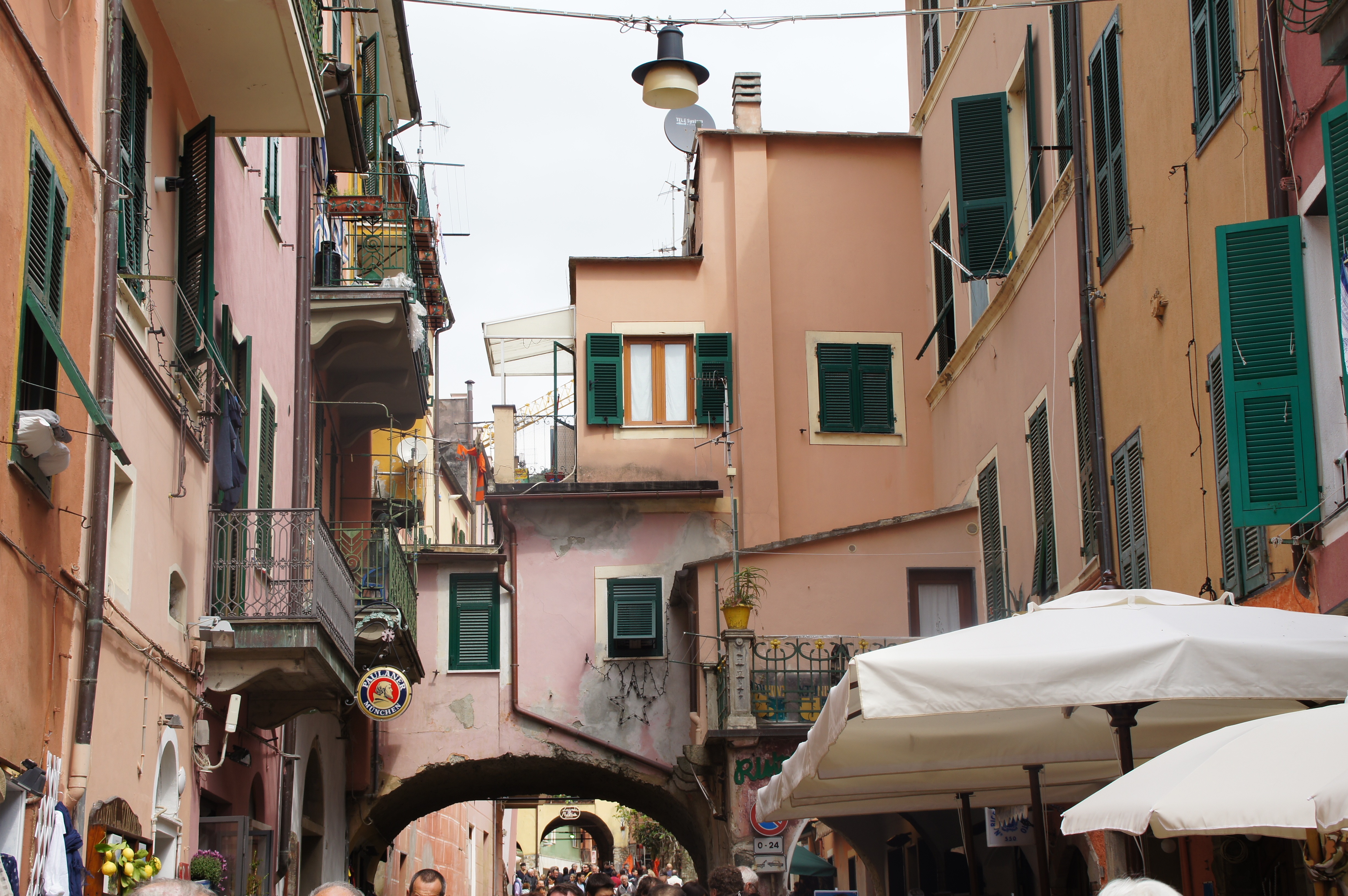 Monterosso